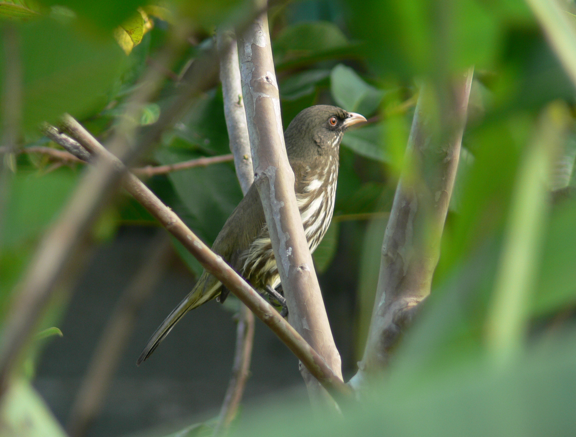 Ave endémica de la isla Hispaniola, hace el nido en las copas altas de los árboles, por ejemplo en la Palma Real. Es el ave nacional de la Republica Dominicana.